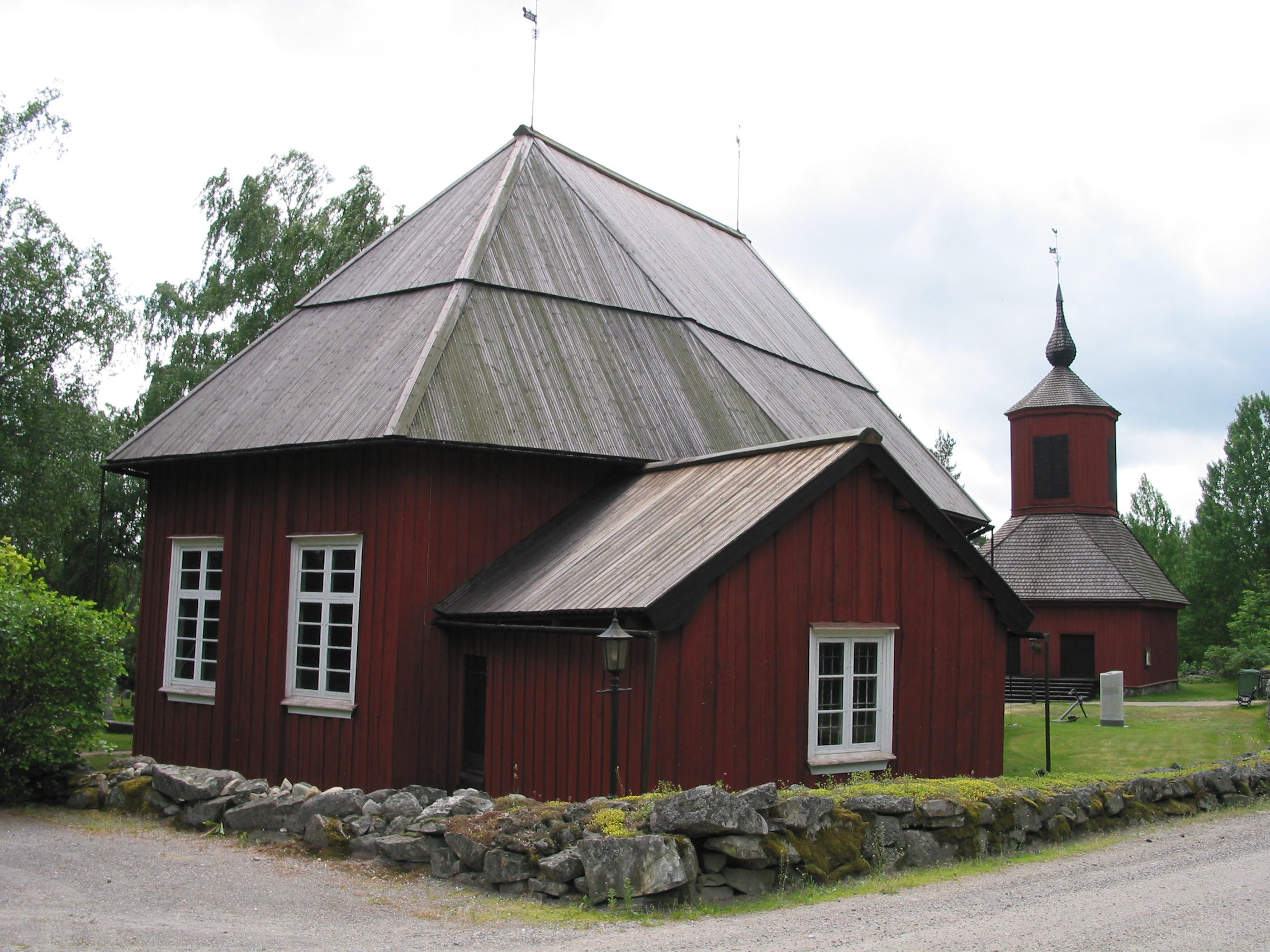 Västanfjärdin vanha kirkko